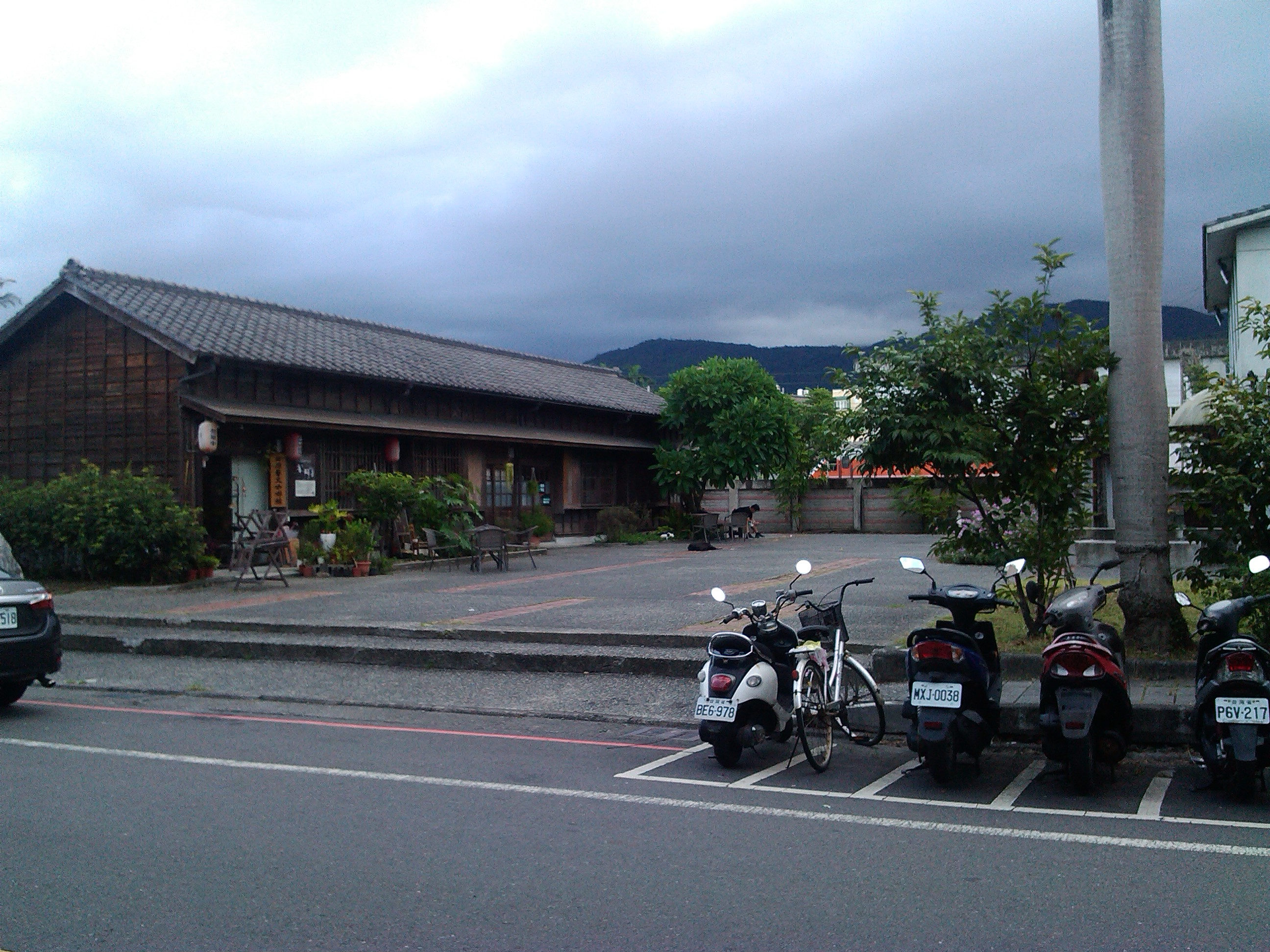 位於頭城火車站南側 前身為鐵路宿舍 後經數單位聯手改造及革新 轉型為複合式功能的休憩園區